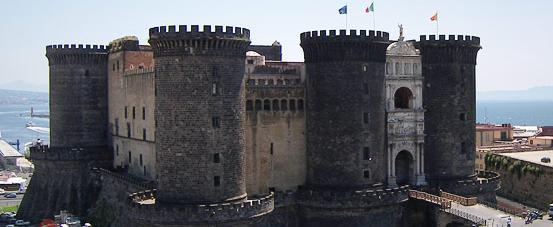 Angioino.